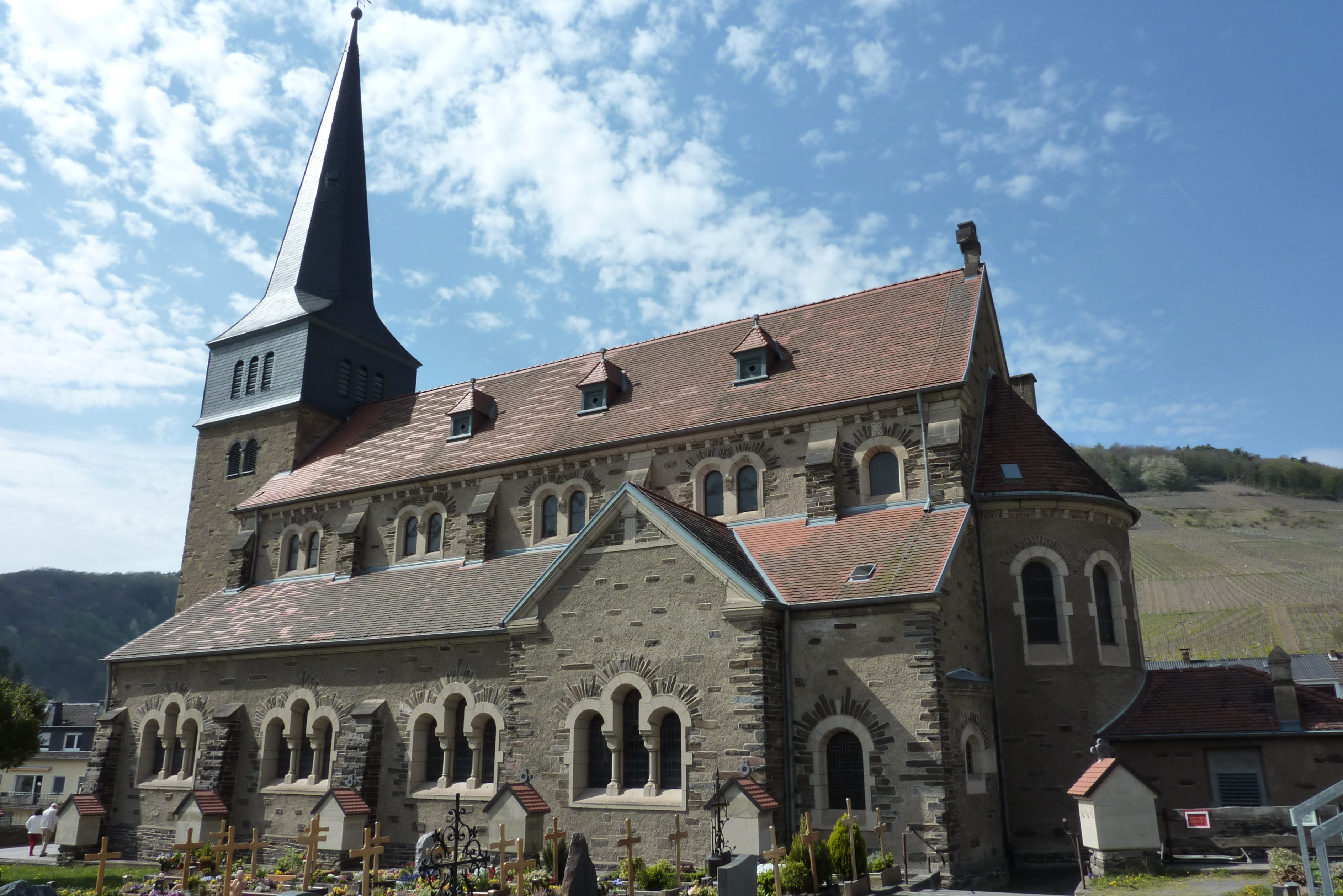 St. Nikolaus und Rochus in Mayschoß, Südseite mit Friedhof und Kreuzweg